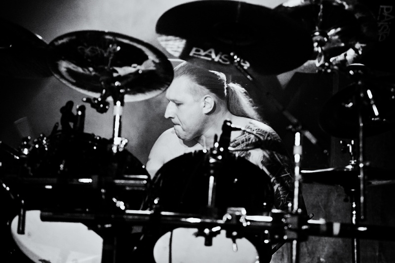 Azarath, Wrocław, Firlej, 6.09.2011